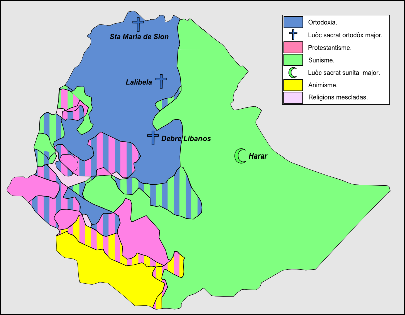 Religions principalas en Etiopia.